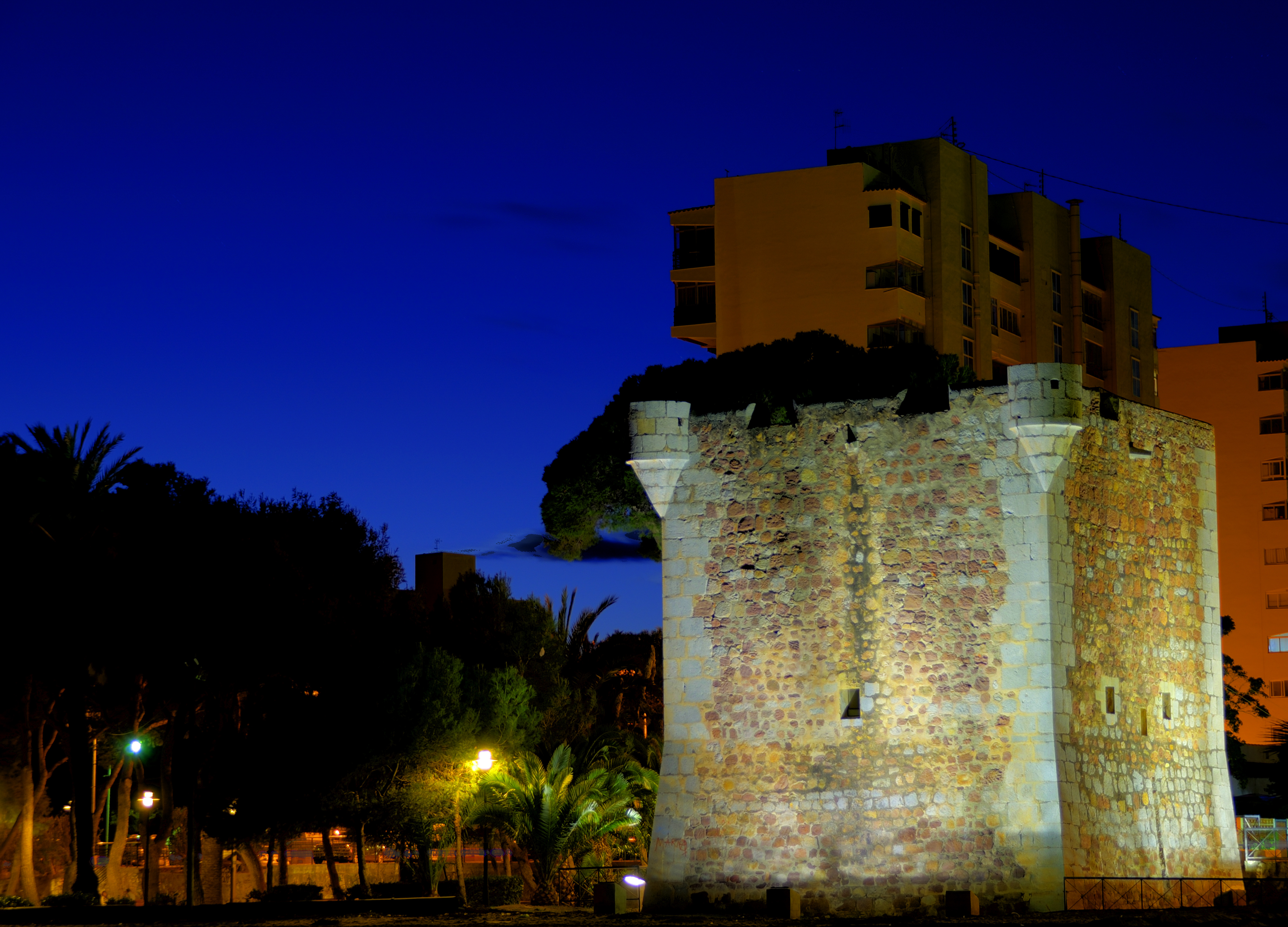 Torre de Sant Vicent, Benicàssim